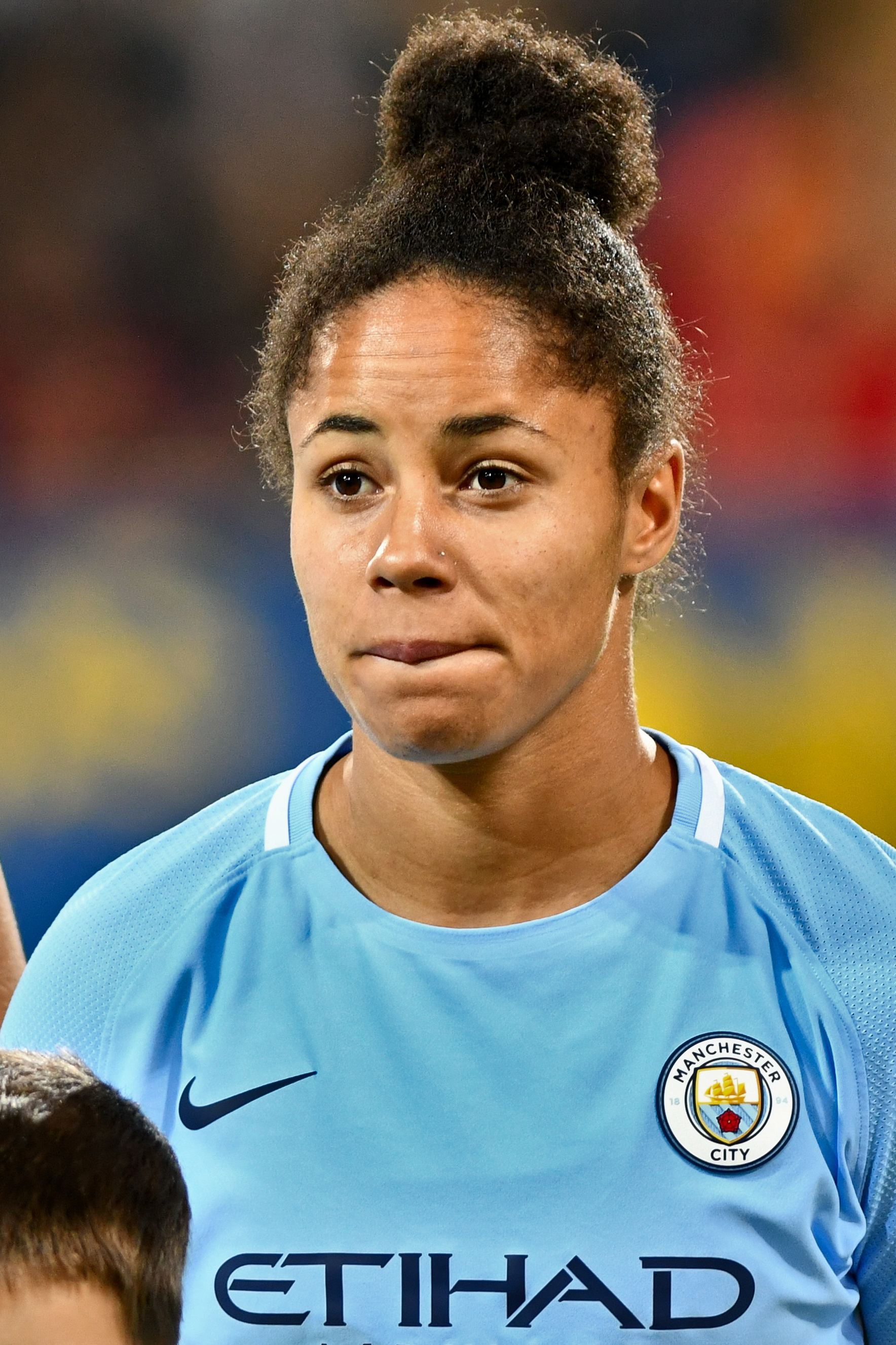 UEFA Women's Champions League 2017/18, Runde der letzten 32, SKN St. Pölten gegen Manchester City W.F.C. am 4.10.2017, Bild zeigt: Demi Stokes